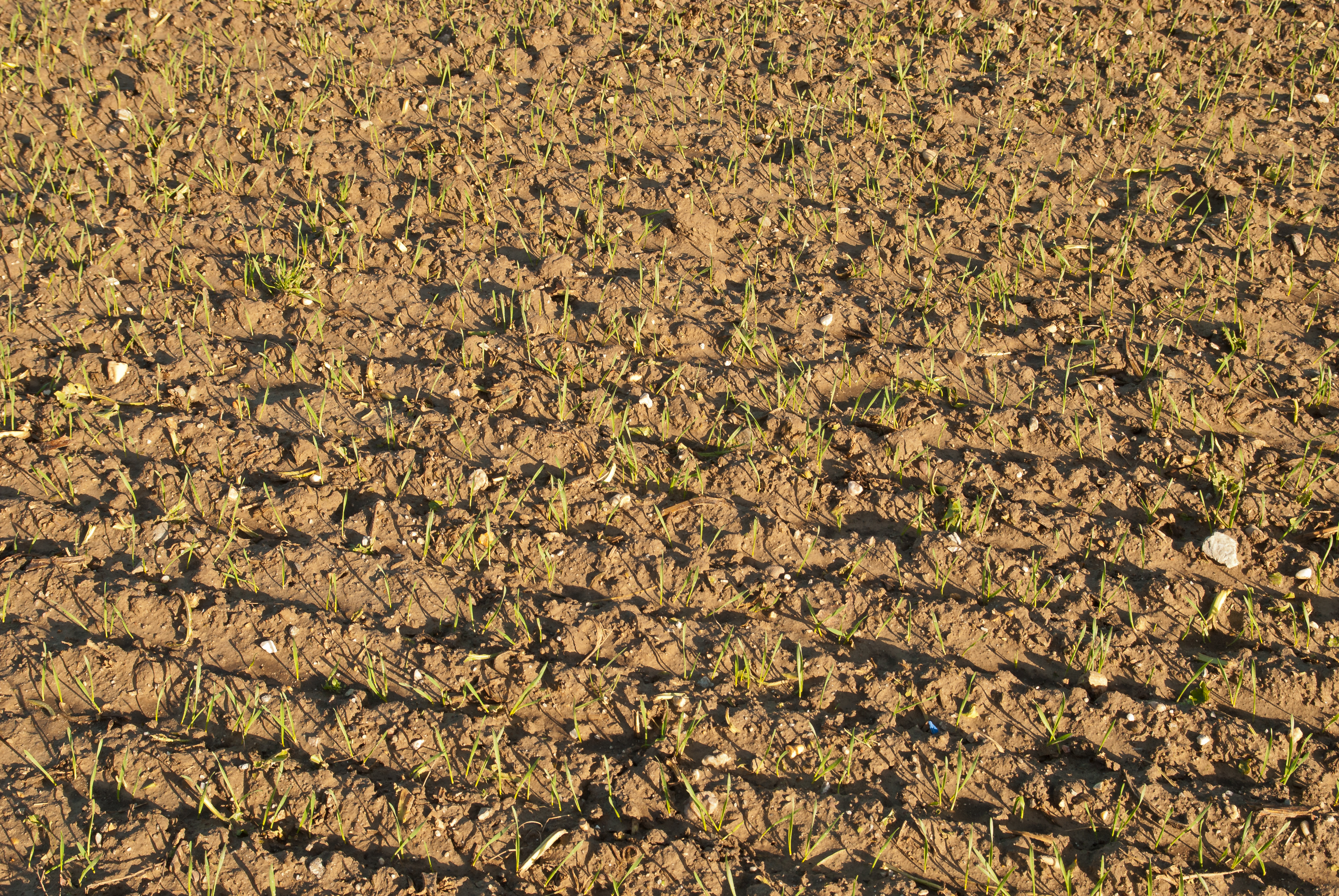 Aufgelaufener, per modifizierter Direktsaat ausgebrachter Winterweizen auf einem Feld der Geilenkirchener Lehmplatte. Zum Zustand vor dem Auflaufen vgl. , dass das den Zustand desselben Feldes rund vier Wochen früher zeigt.